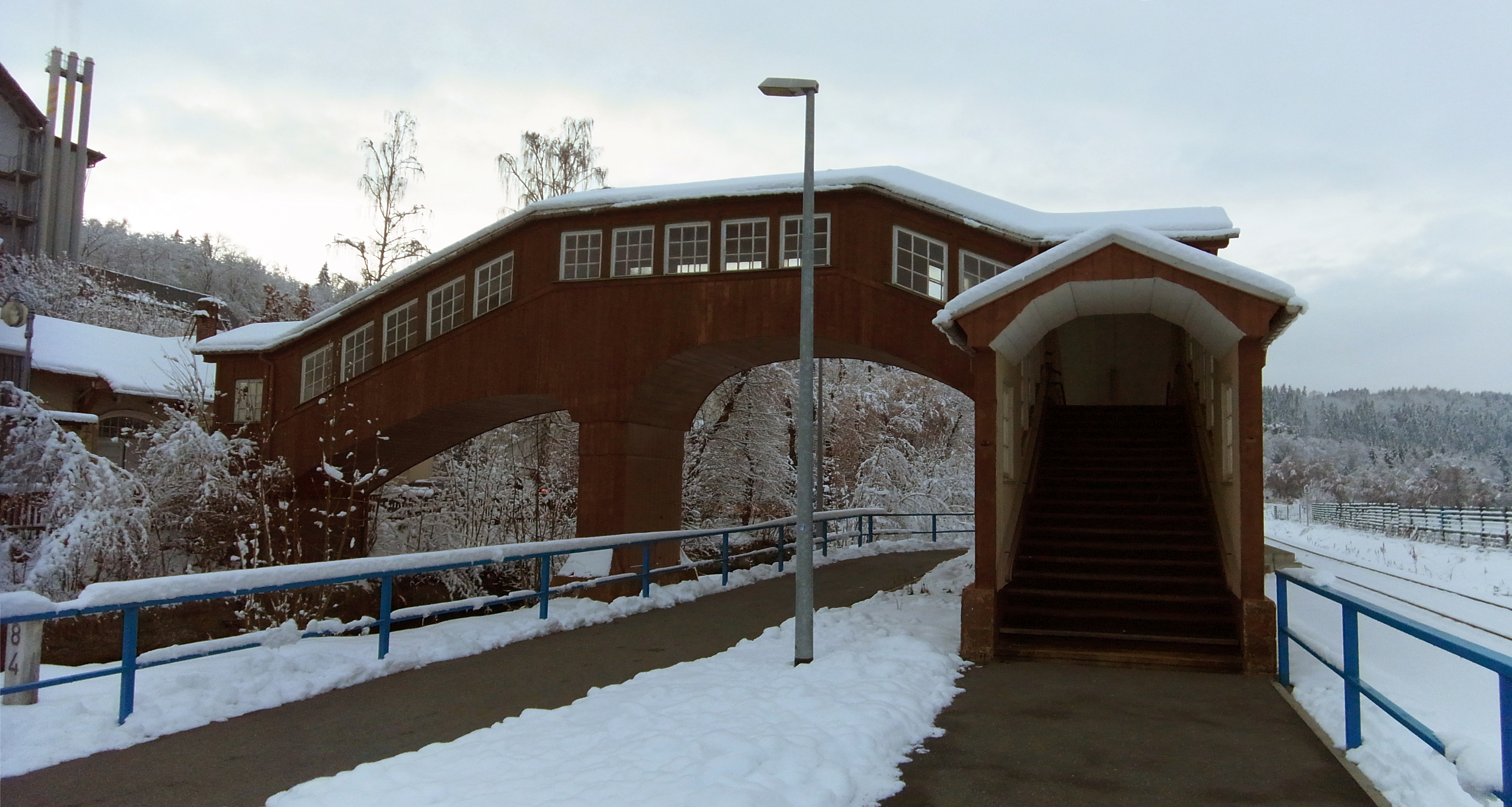 Zschopautalbahn, Bahnhof Thermalbad Wiesenbad (Dezember 2012)